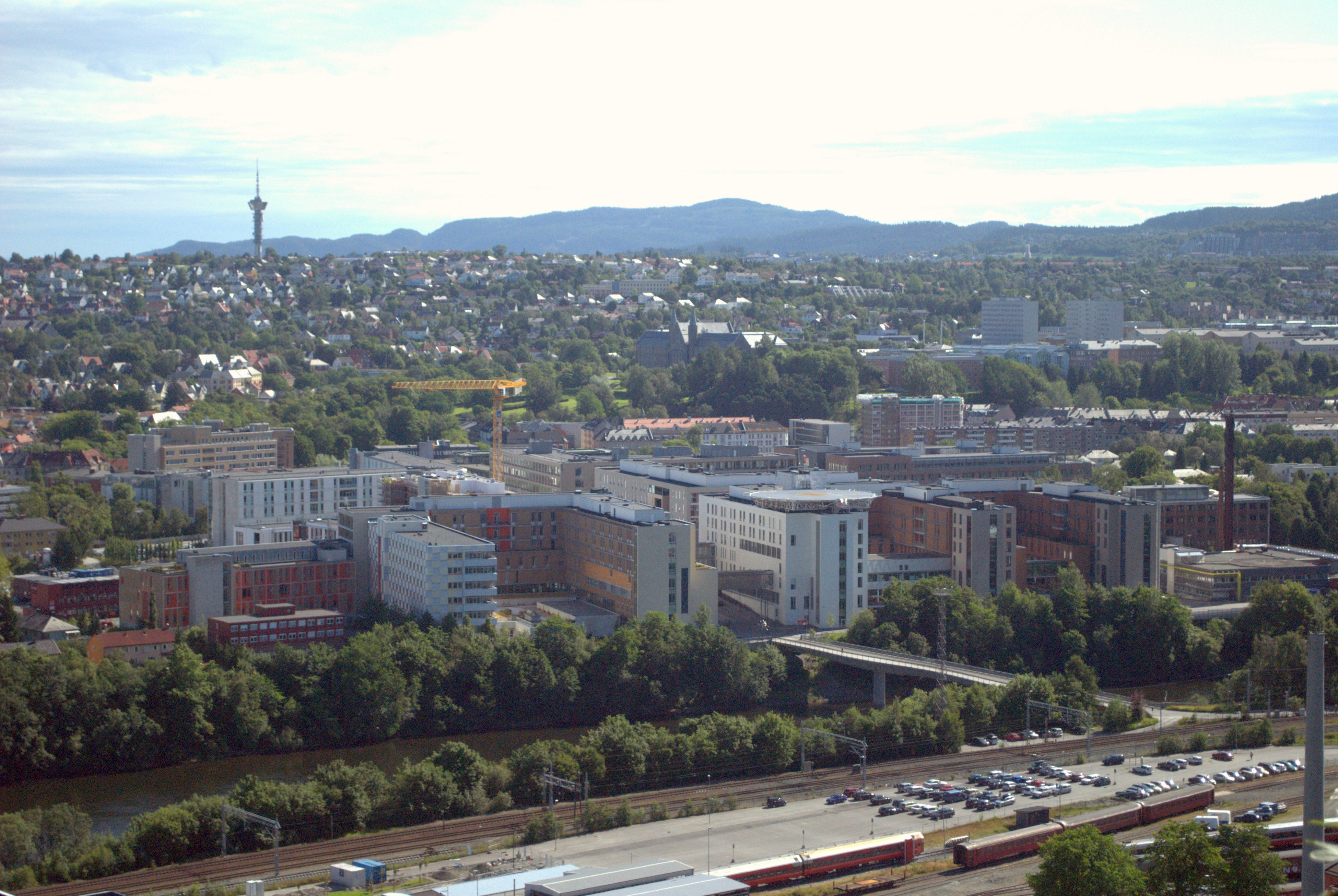 St. Olavs hospital i Trondheim sett fra Utsikten.